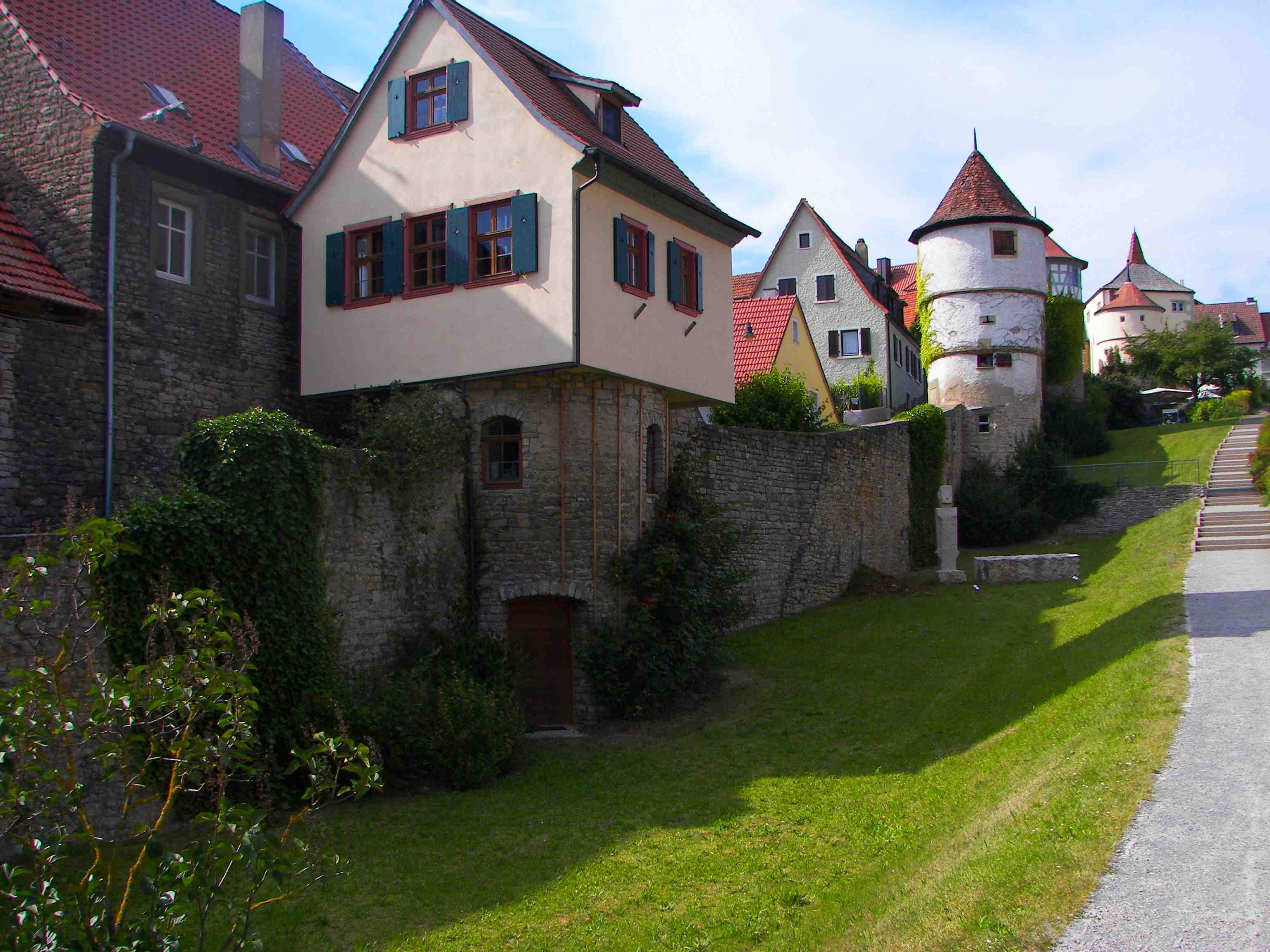 Die Stadtmauer von Dettelbach